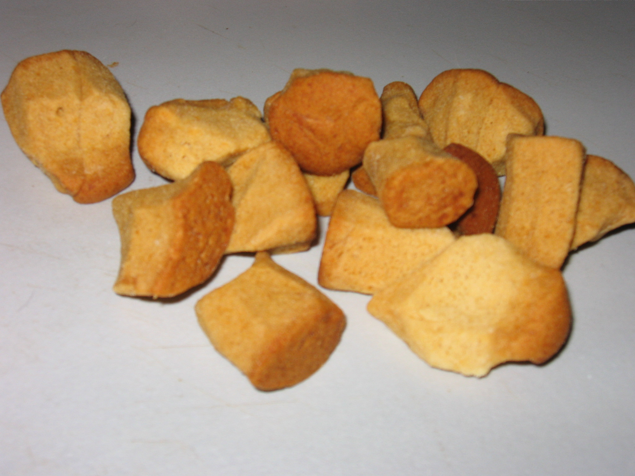 Taai Taai